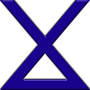 simbolo deista